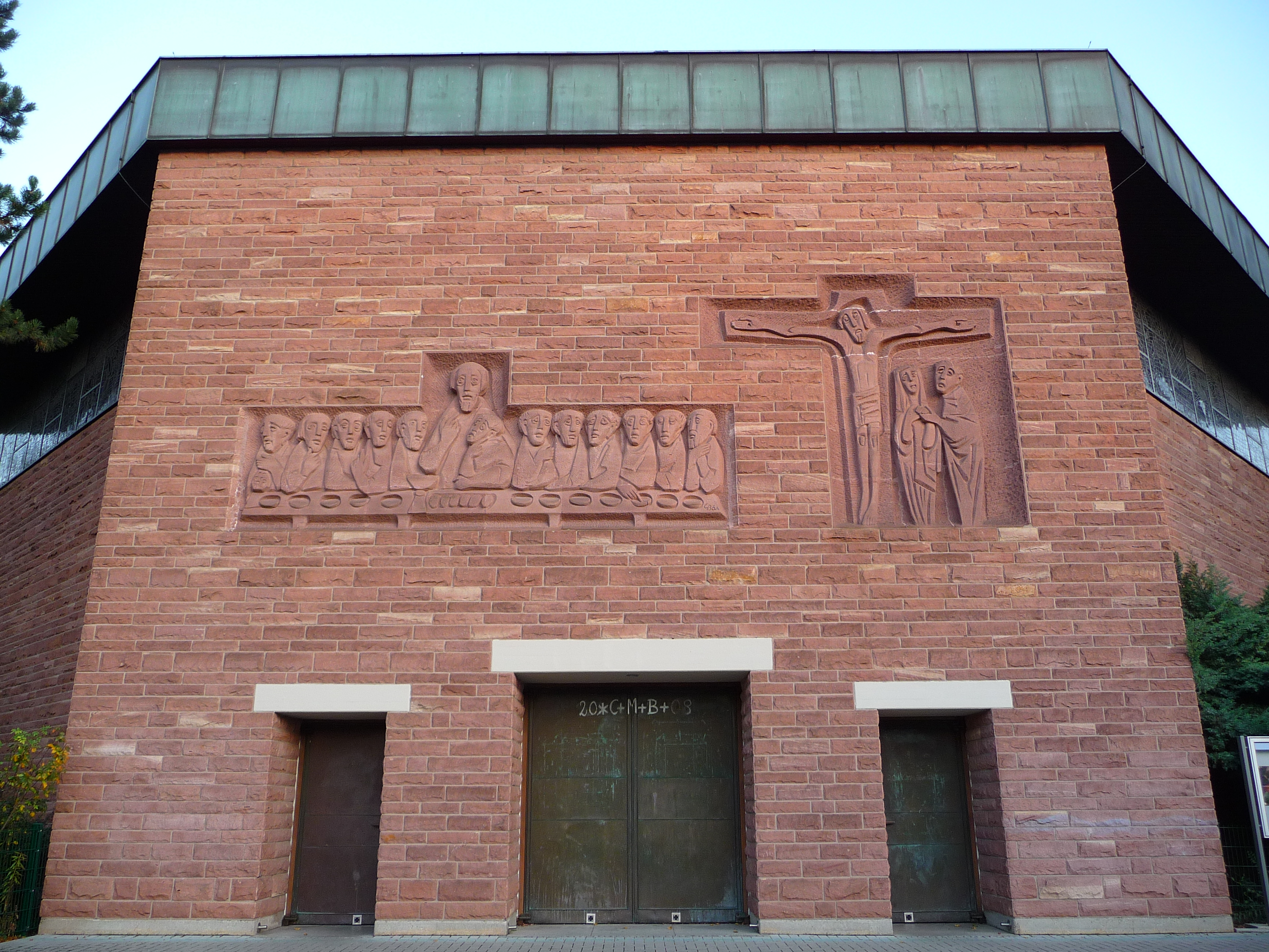 Haupteingang der katholischen Kirche St. Johannes im Heidelberger Stadtteil Rohrbach (Baden-Württemberg, Deutschland)